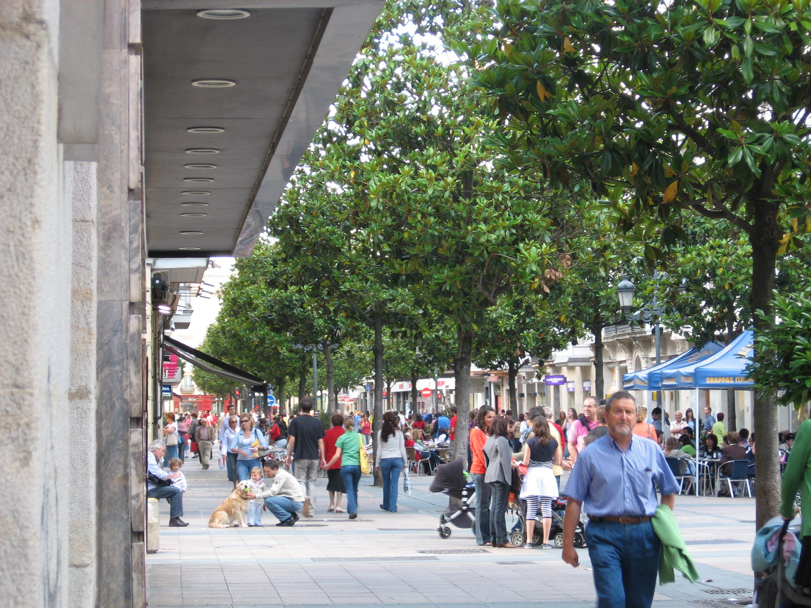 Ensanche de Vitoria Cruce de la calle Dato con la calle San Pruedencio